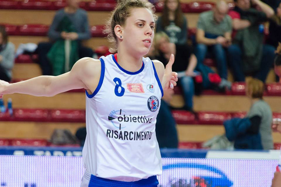 Pallavolista serba, gioca nel ruolo di centrale